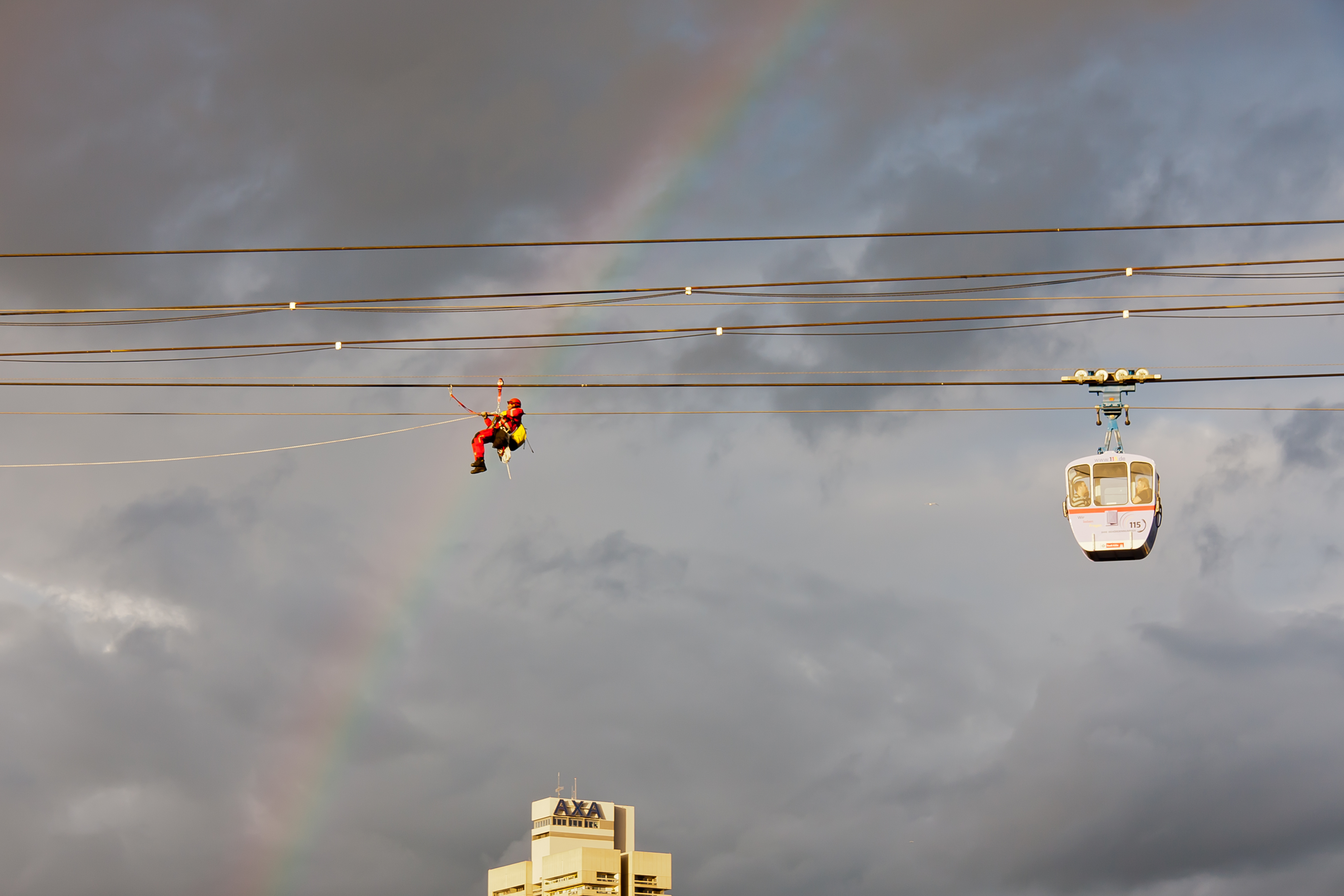 Höhenrettungsübung der Feuerwehr Köln an der Seilbahn über den Rhein.